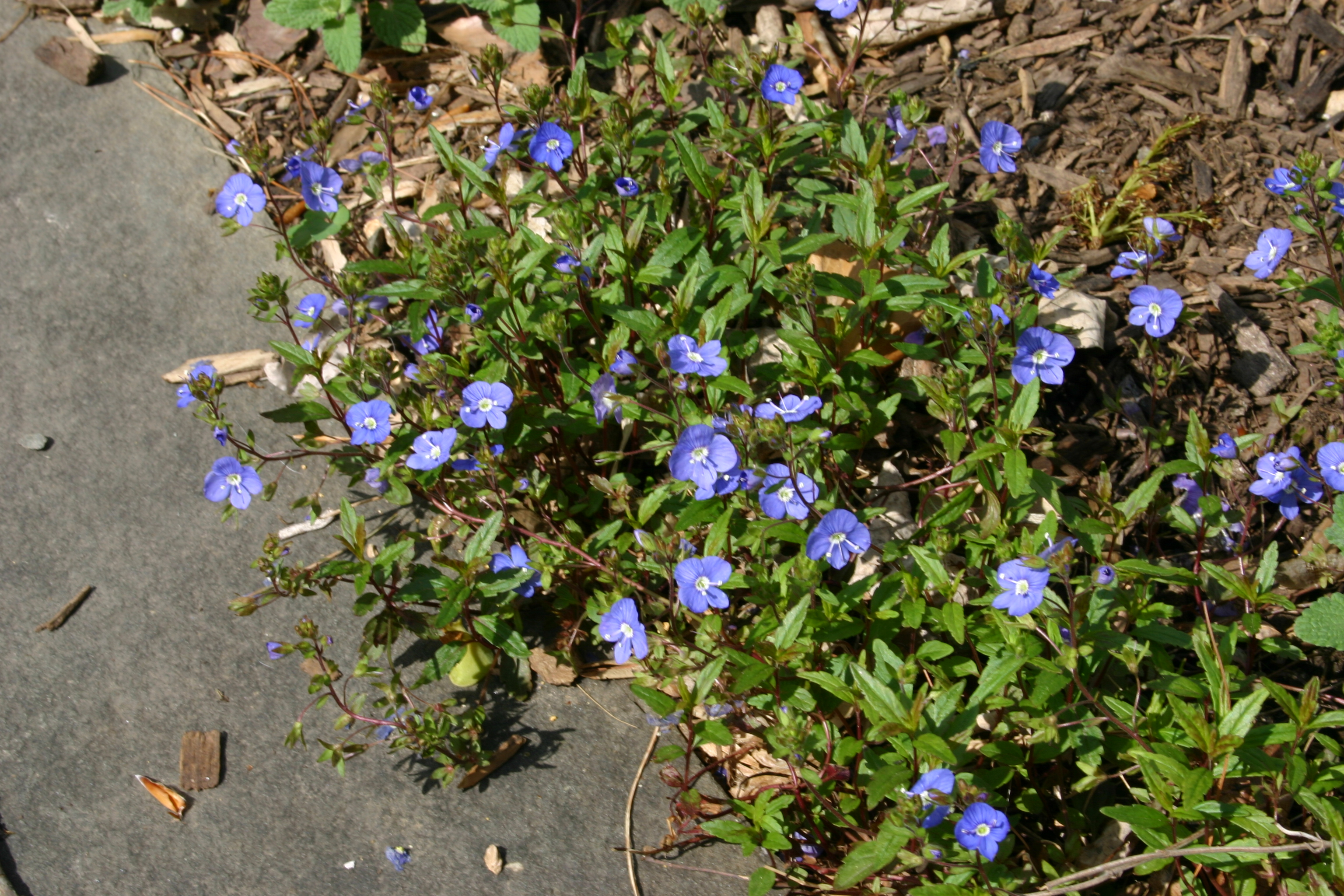 Veronica peduncularis (cv. 'Georgia Blue')